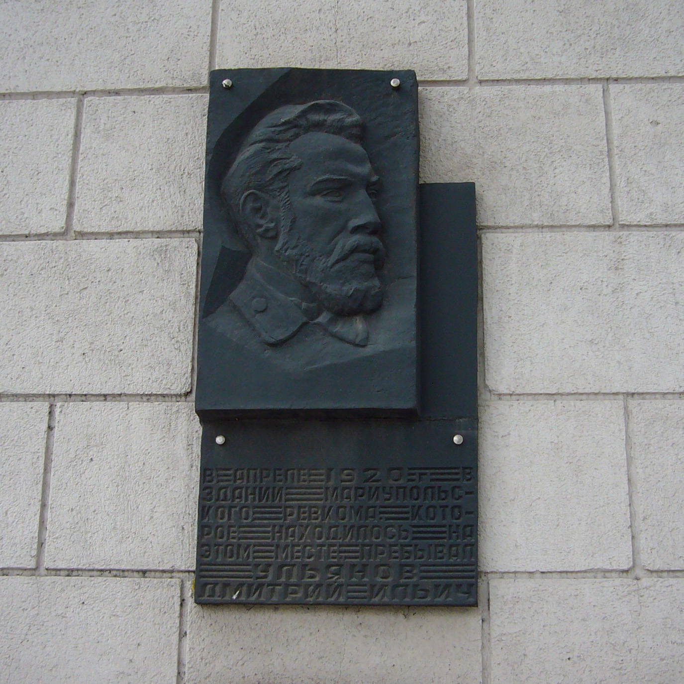 Мемориальная доска на ул. Артёма, 48